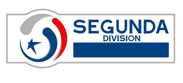 Logotipo de la segunda división profesional de Chile